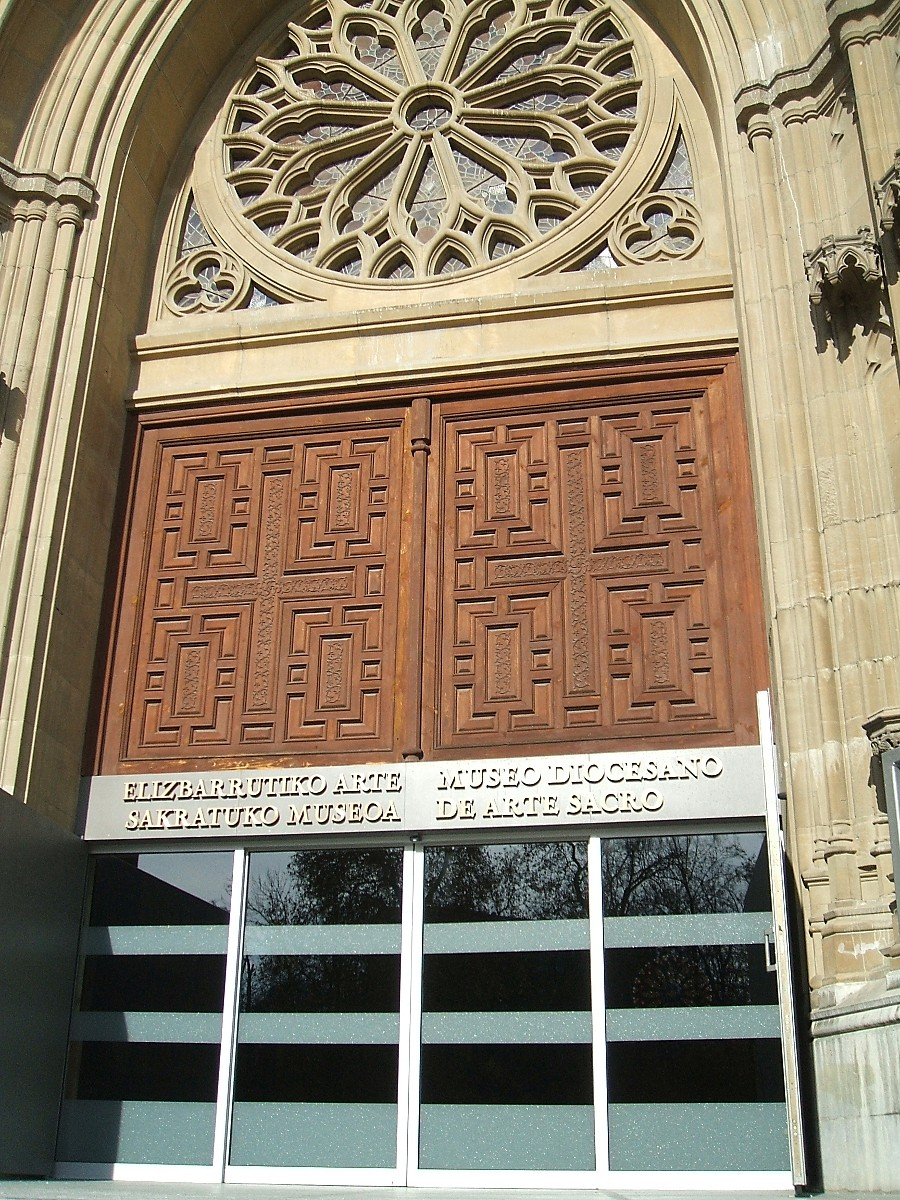 Museo Diocesano de Arte Sacro de Álava, situado en la girola de la Catedral Nueva de Vitoria-Gasteiz